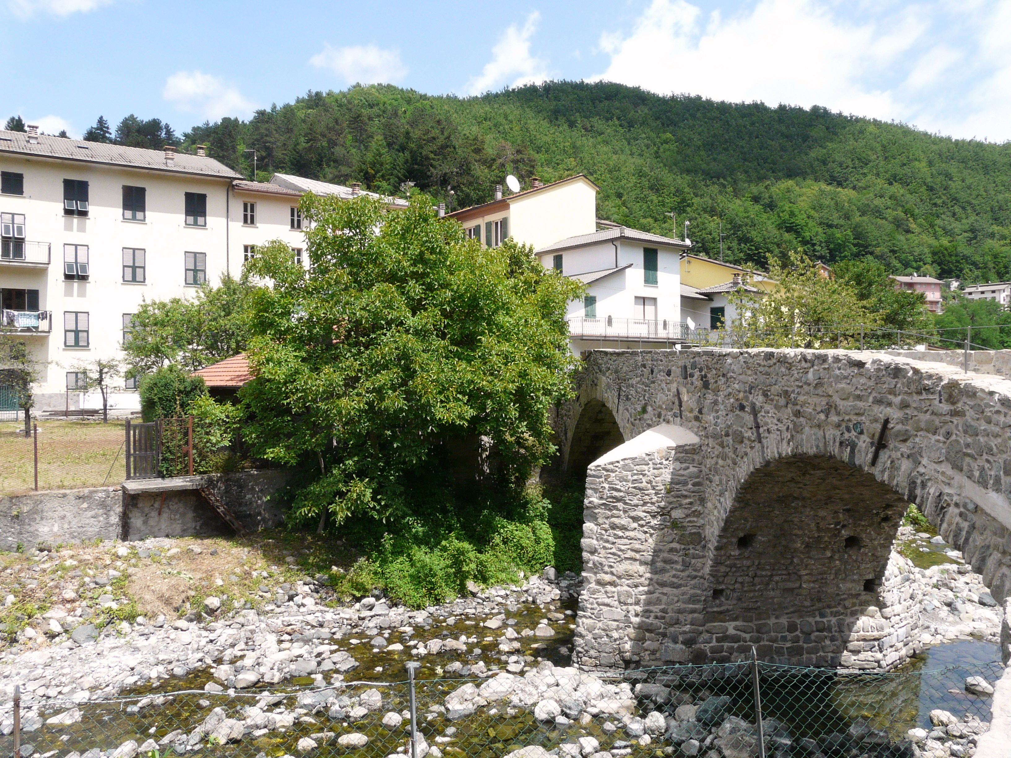 Il ponte dei Priori, Santa Maria del Taro, Tornolo, Emilia-Romagna, Italia